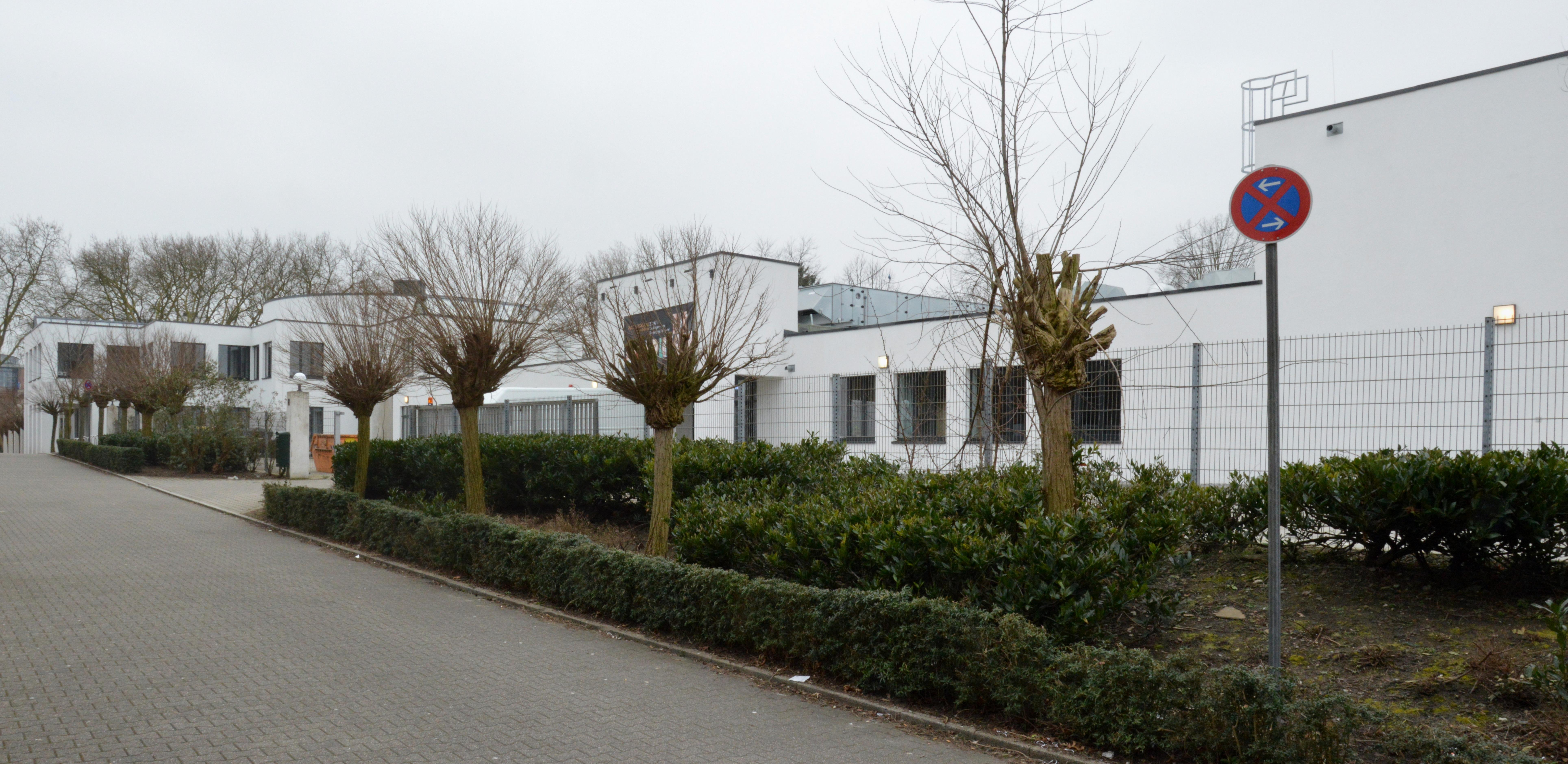 Folkwang-Hochschule, Campus Bochum